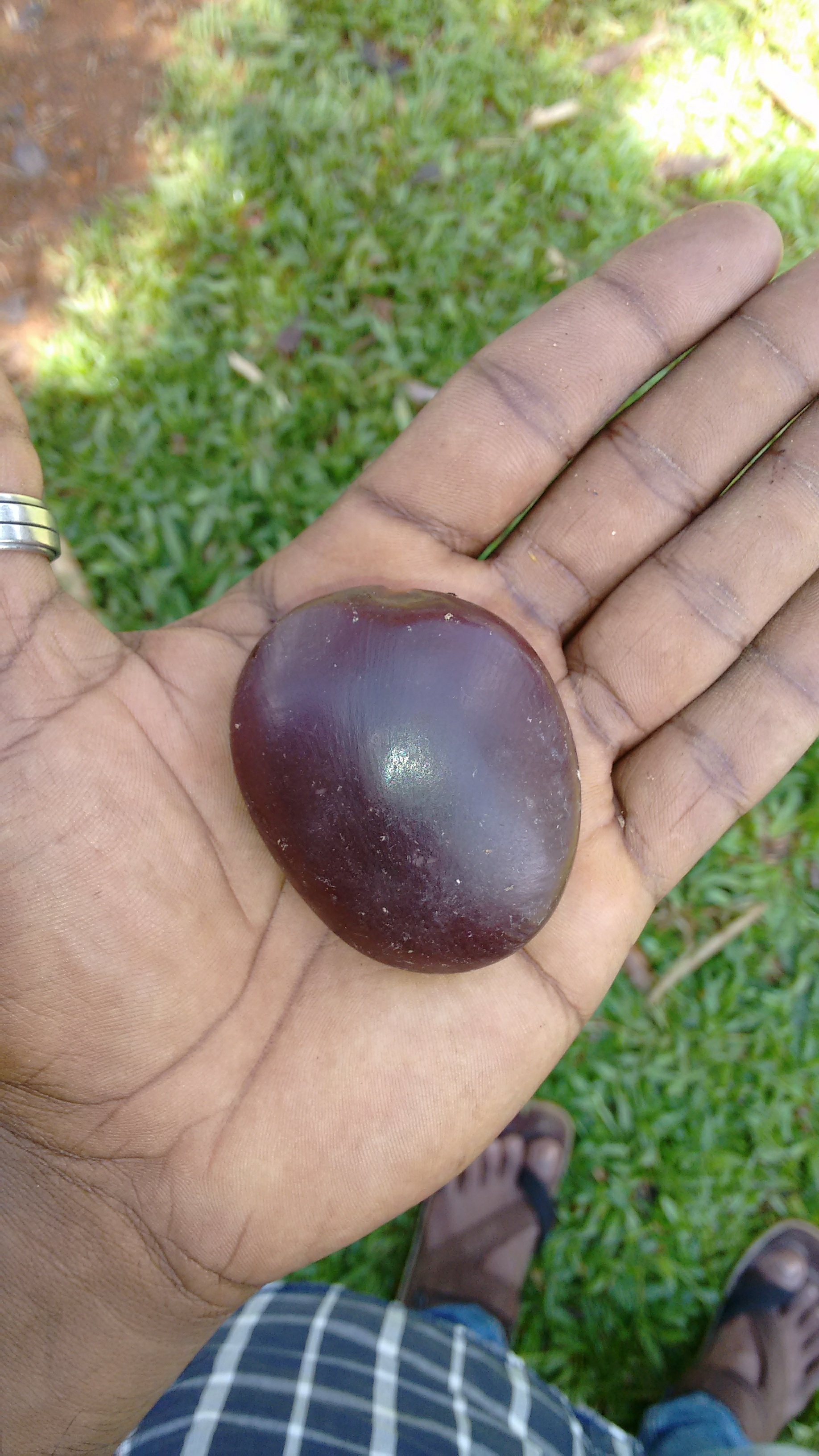 Entada rheedei, Sea Bean. From Ezhupunna